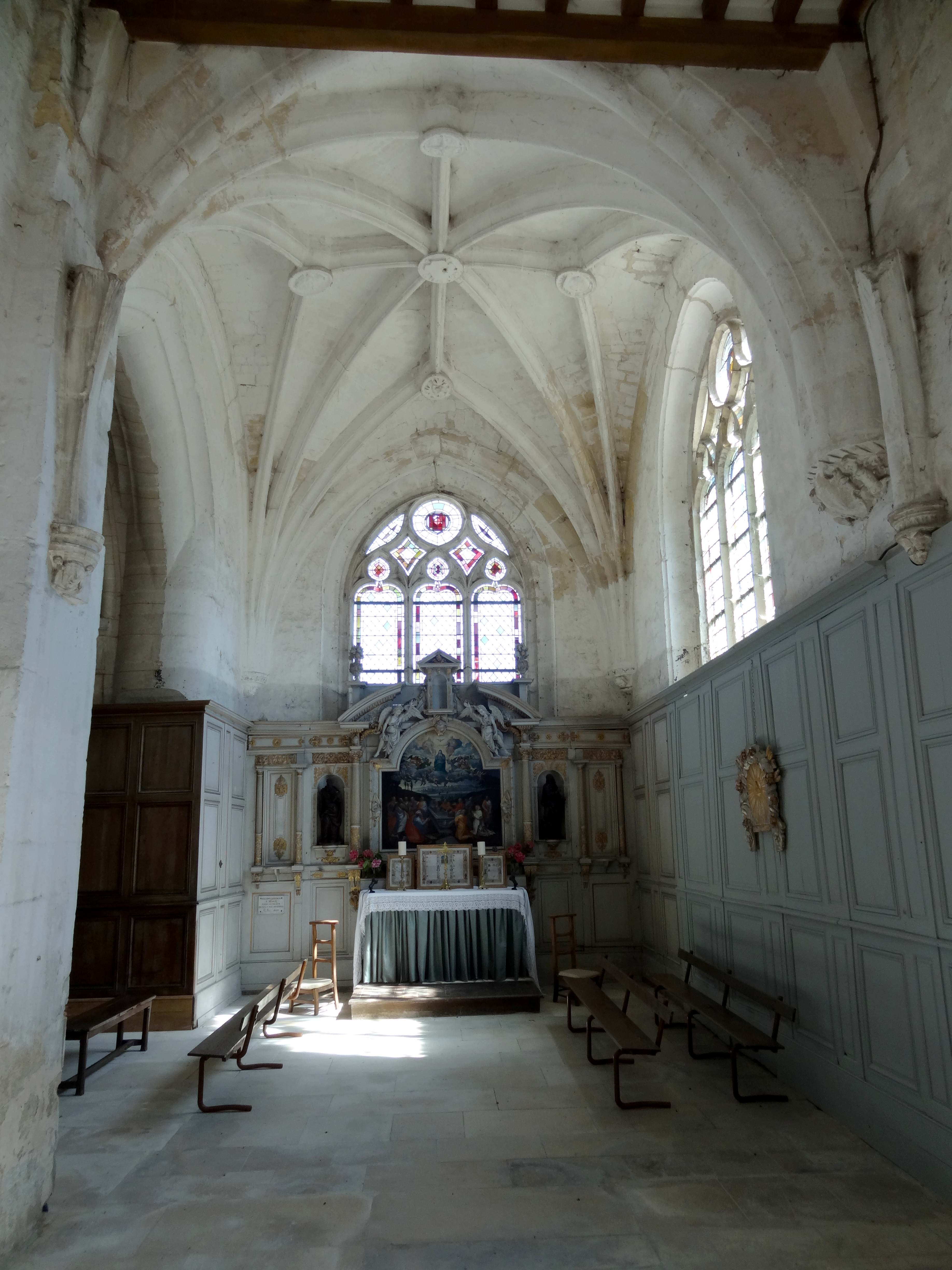 Intérieur de l'église - voir titre.